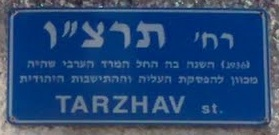 רחוב תרצ"ו בתל אביב